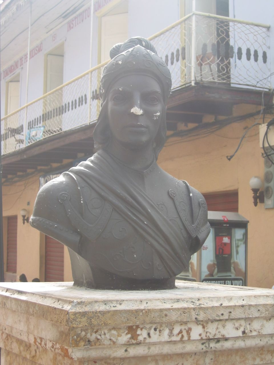 Estatua de Bartolome Colón...Otro ángulo de la estatua de bronce en la Zona Colonial, República Dominicana.